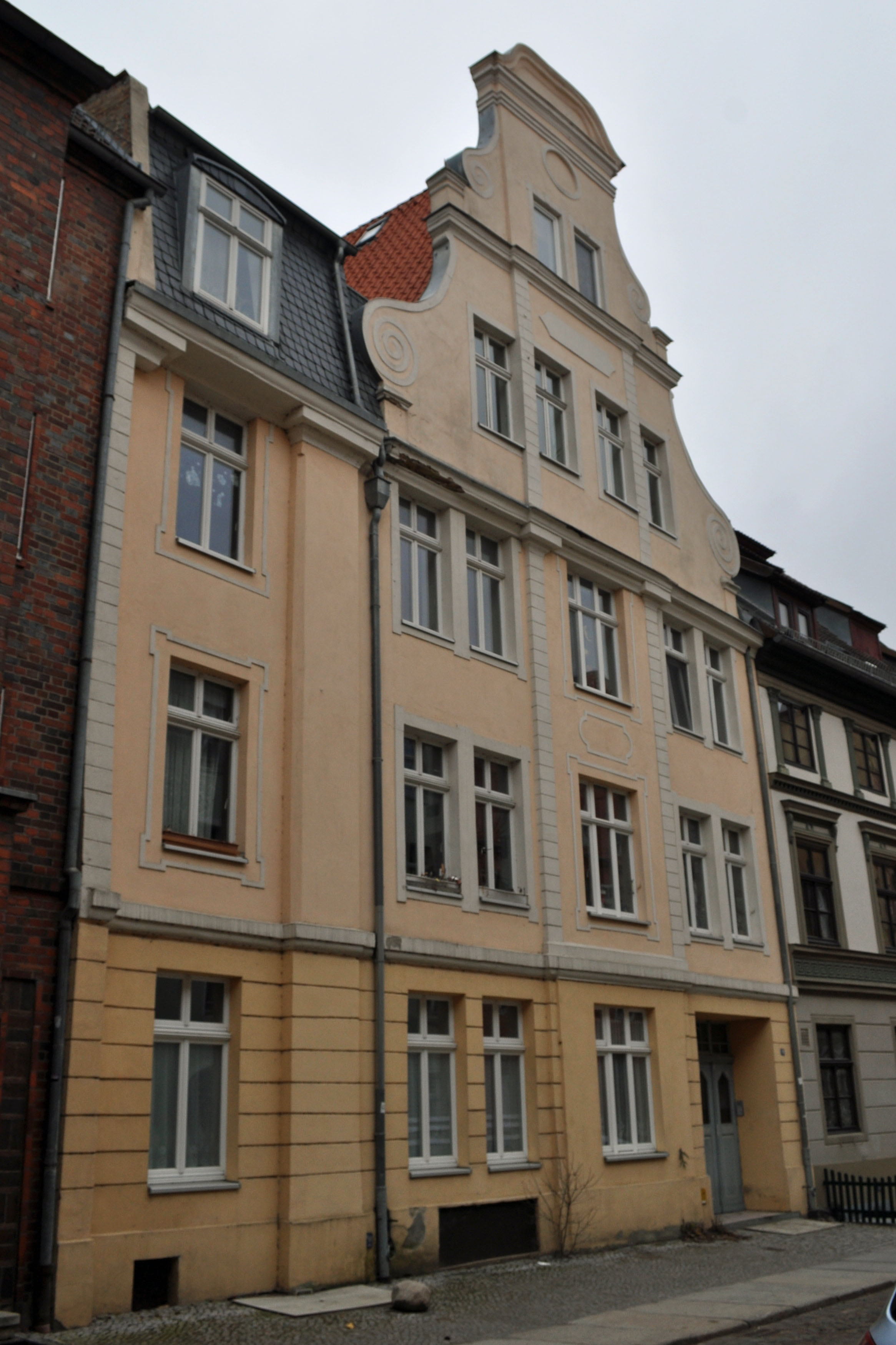 Gebäude bzw. Gebäudedetail in Stralsund. Straße und Hausnummer siehe Dateiname.